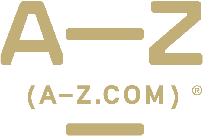 A-Z logga